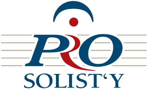 Das Logo der Blaskapelle "Pro Solisty" mit dem Schriftzug aud den fünf Notenlinien und einer Fermate darüber.